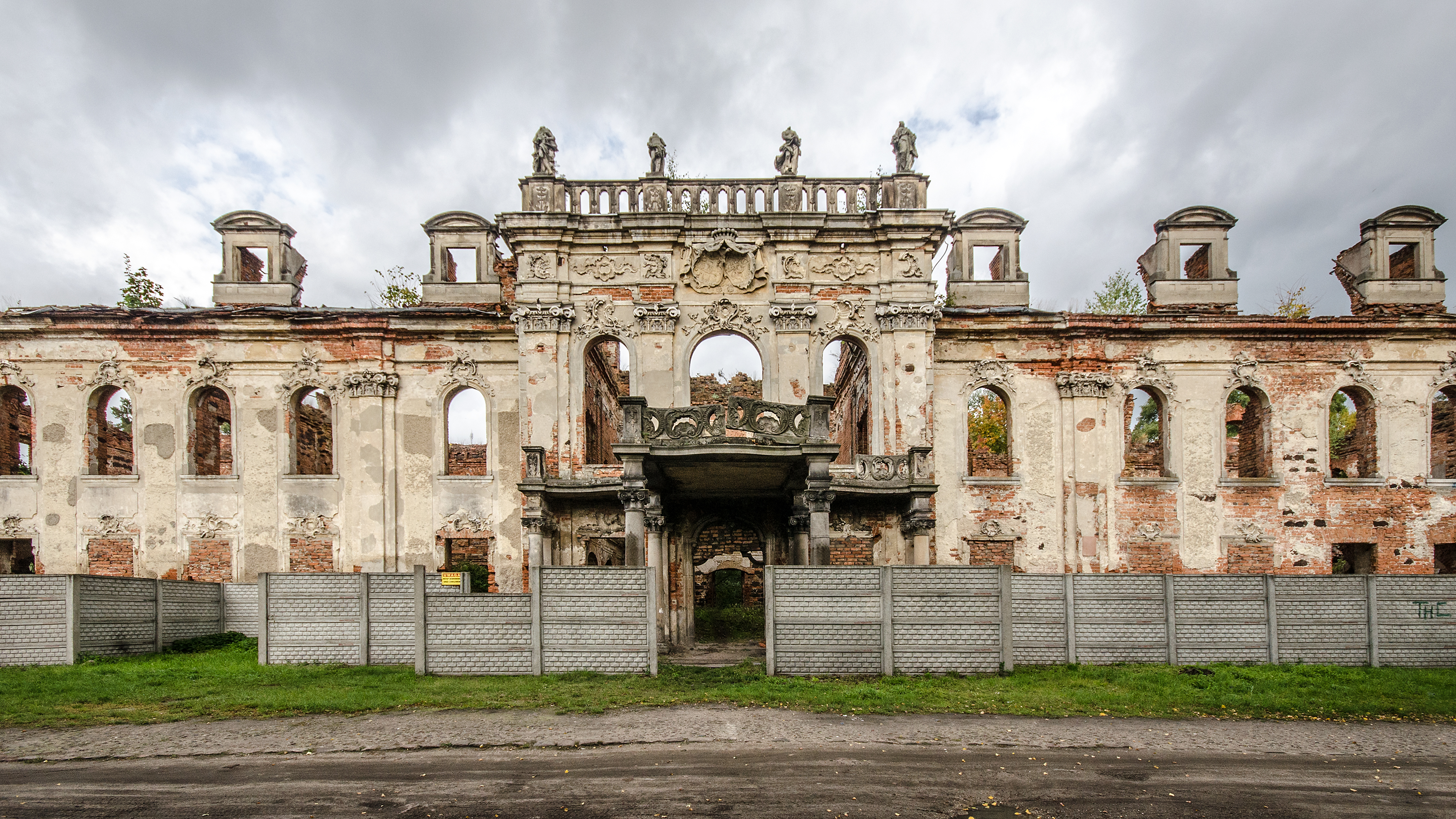 Goszcz, pałac, ok. 1750, XIX